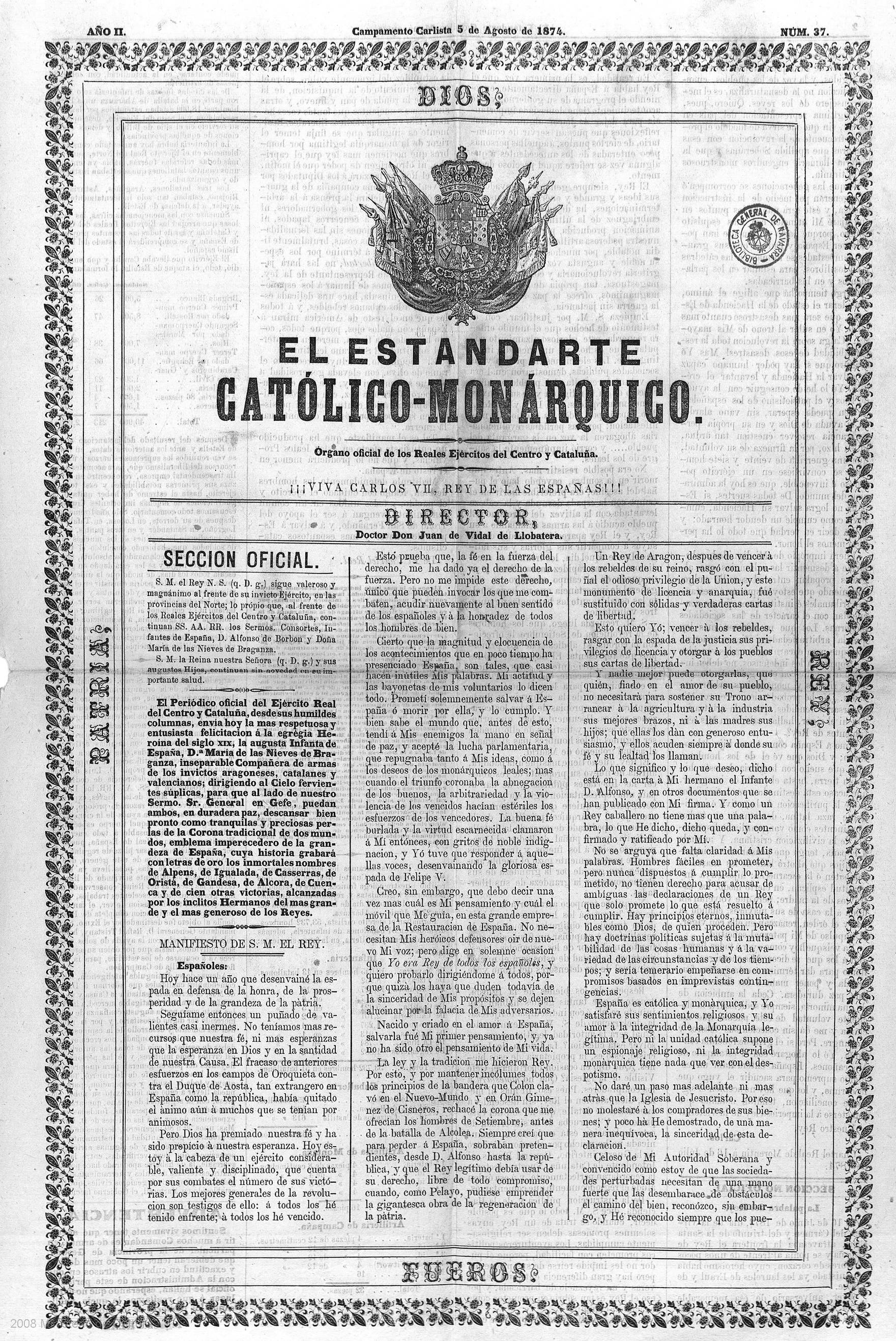 El Estandarte Católico-Monárquico